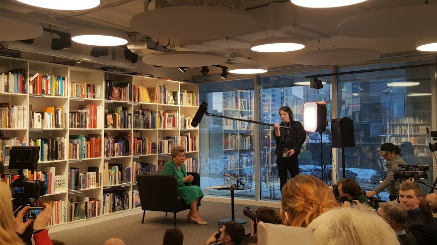 Наина Ельцина в магазине "Пиотровский" читает свои воспоминания. Екатеринбург. Ельцин-центр